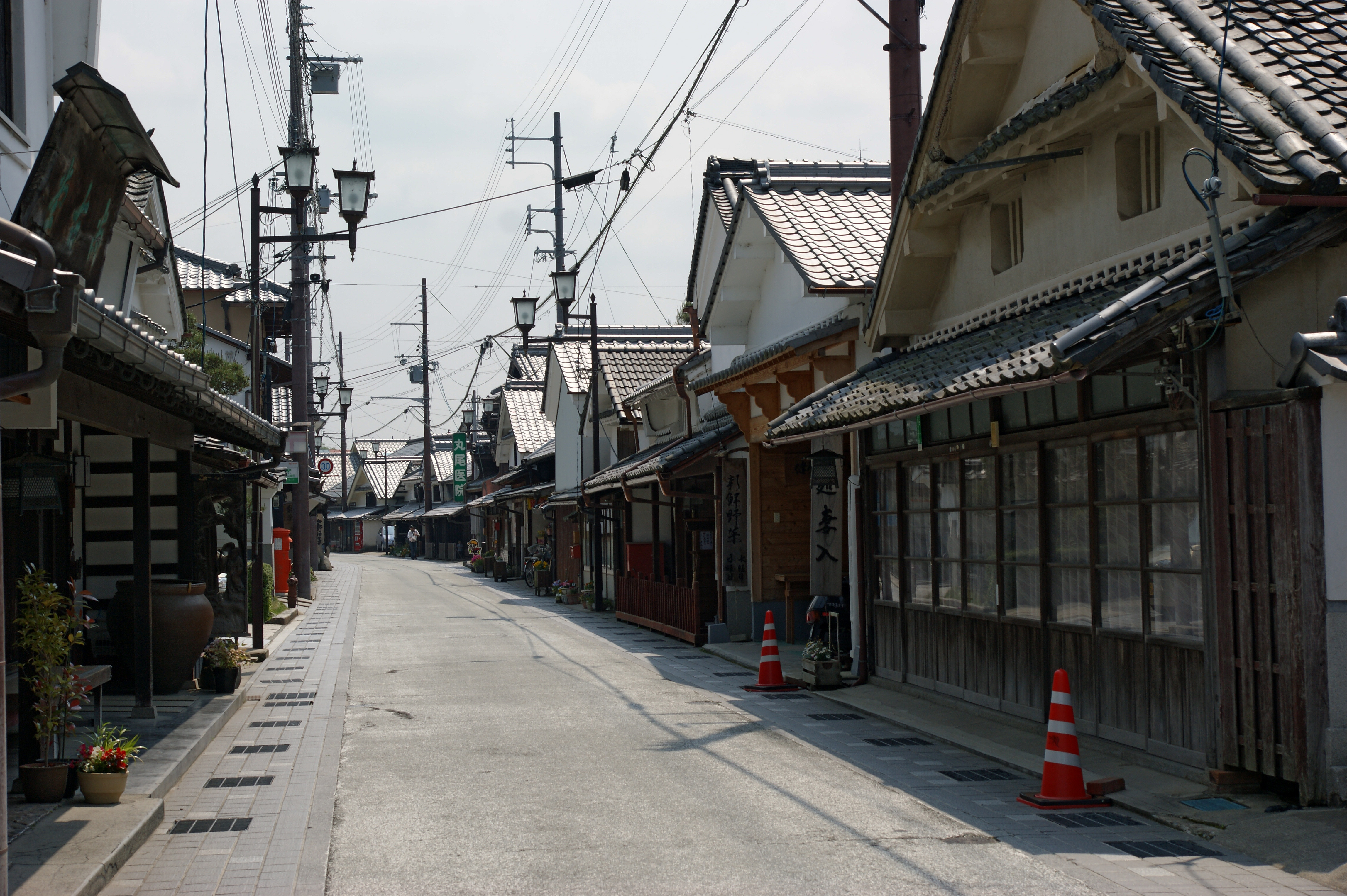 Kwara-machi in Sasayama, Hyogo prefecture, Japan